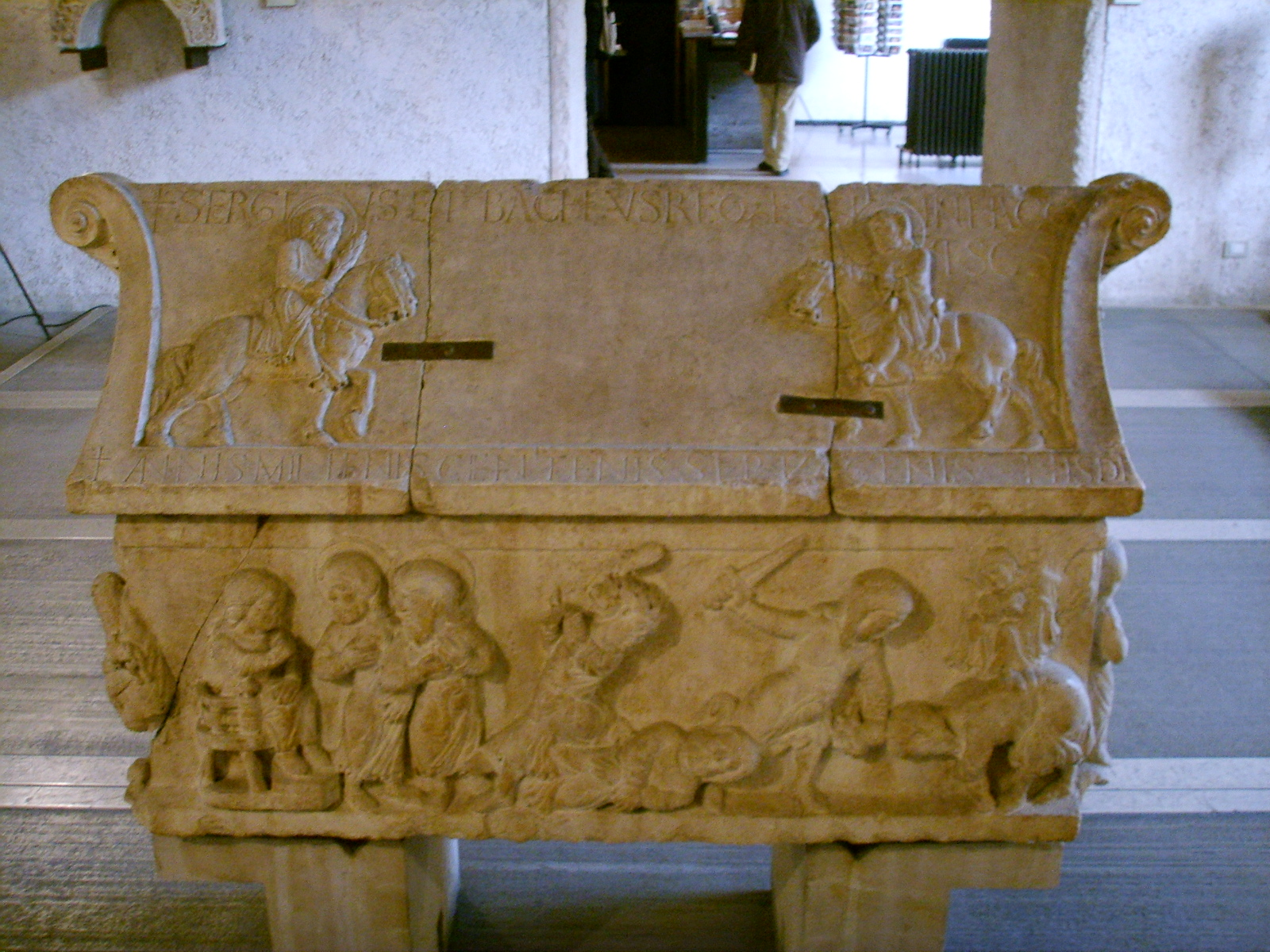 Museo di Castelvecchio a Verona, Sarcofago dei santi Sergio e Bacco.